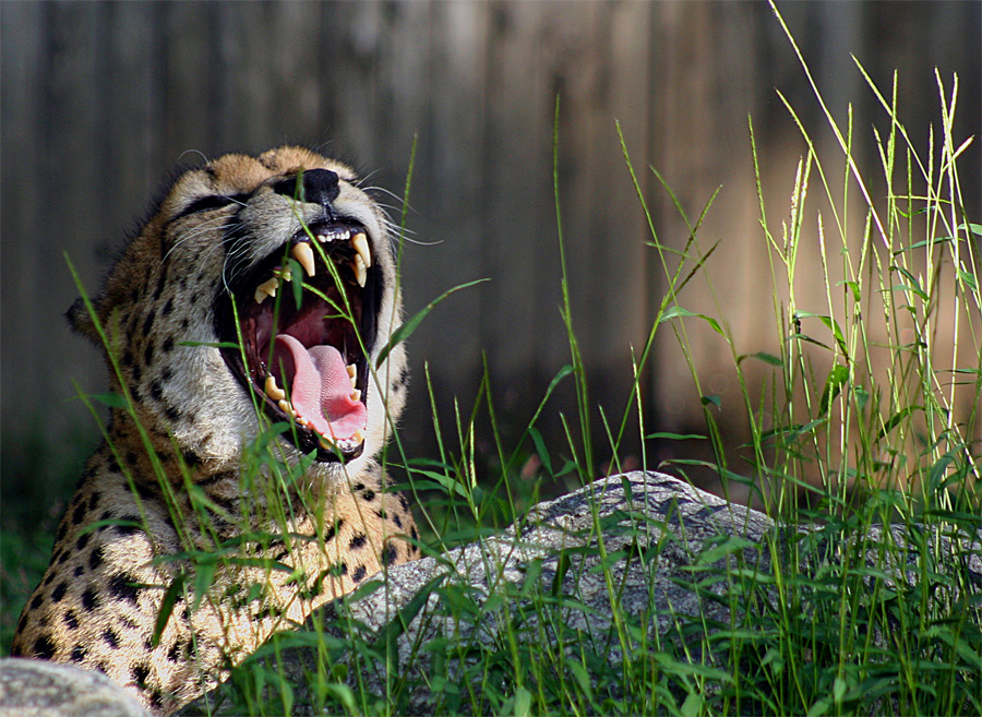 ചീറ്റപ്പുലിയുടെ ദ്രംഷ്ട്രകൾ.